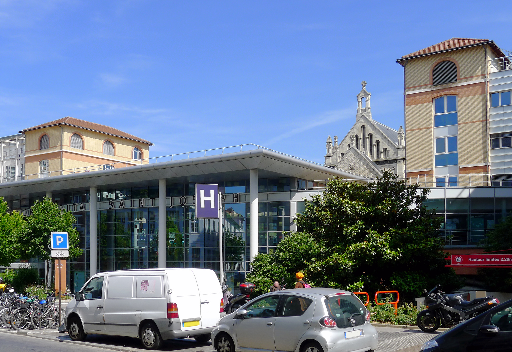 Hôpital Saint-Joseph (entrée rue Raymond-Losserand) - Paris XIV